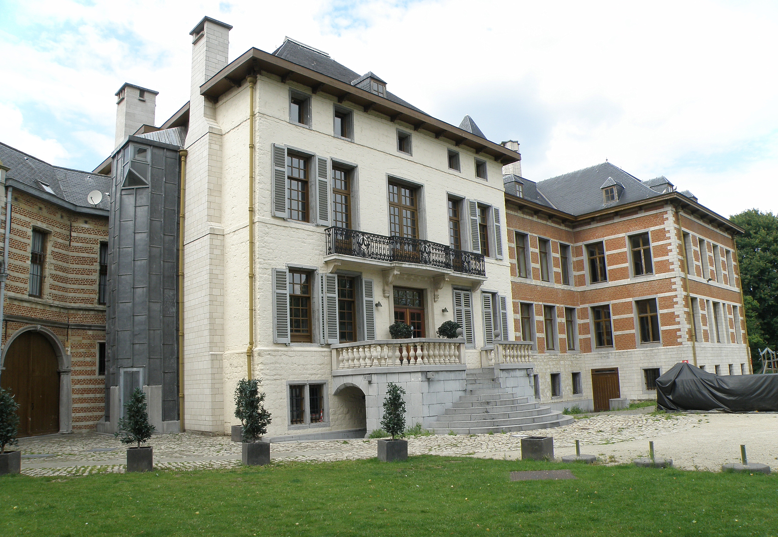 Anvers, Belgique. Château et manoir de plaisance dit Bisschoppenhof, complexe de bâtiments contigus, sis Suzanne Spanhovenstraat à Deurne-Nord, dans la banlieue nord-est d’Anvers, sur le bord d’un terrain circulaire arboré et entouré d’une douve. Le complexe comprend : une porterie du XVIe siècle, auquel donne accès un pont à arche ; attenant à celle-ci, sur son côté gauche, le corps de logis principal, daté du XVIIe, mais remanié (not. les baies et le perron) fin XIXe ; contigu à ce dernier, un autre corps de logis, extension datant du début XIXe. Façade sud-est de l'édifice. On distingue, de gauche à droite : la porterie, visible en partie seulement ; le corps de logis principal (pierre blanche, avec perron et balcon) ; et l'extension dix-neuviémiste (brique rouge, soubassement de pierre). .